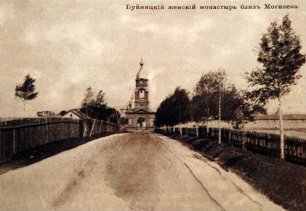 Беларуская (тарашкевіца): Буйнічы